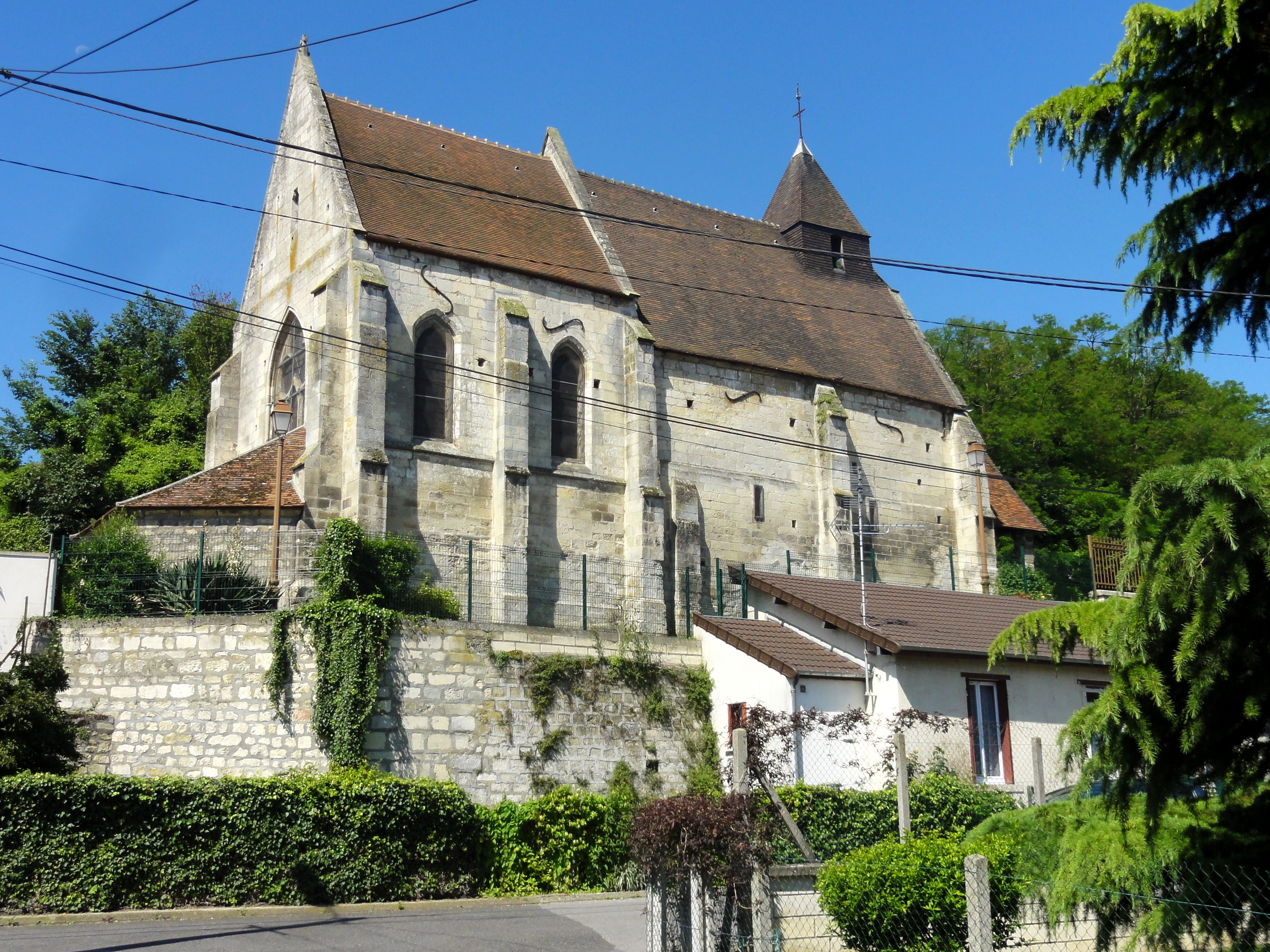 Vue depuis le nord-est.